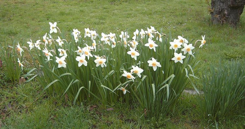 Narzissen in einem Garten in Leibnitz (Österreich)